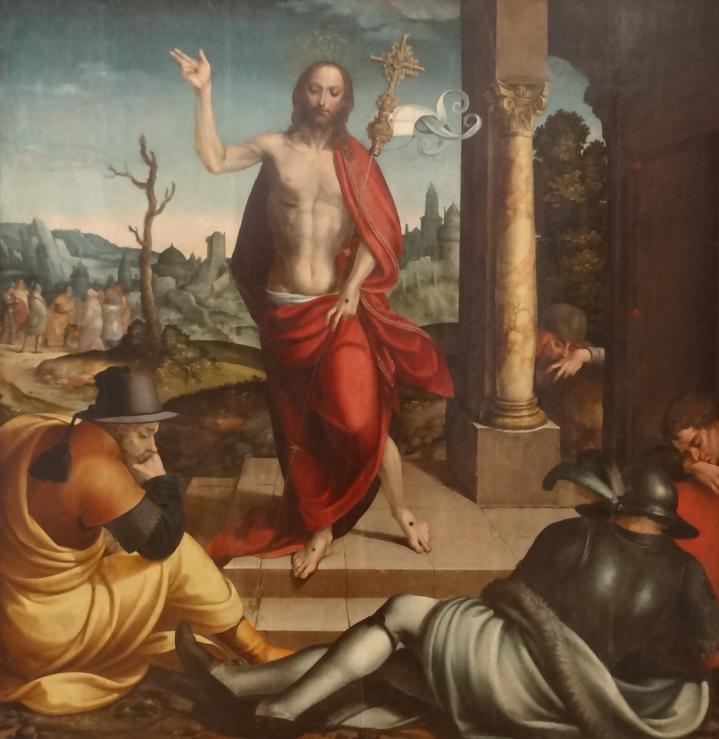 Trata-se de um dos oito painéis do Retábulo do Mosteiro da Trindade, em Lisboa, tendo de altura 160 cm e de largura 160 cm e representa o episódio bíblico da Ressurreição de Jesus.